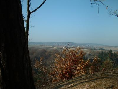 Blick vom Kienberg im Tharandter Wald. GNU-FDL selbst fotografiert 14.11.2003. Source: Photo taken and originally uploaded to Bild:Kienberg.jpg by Benutzer:Shelog: 18:48, 23. Nov 2003 . . Shelog (Diskussion) . . 400 x 300 (19697 Byte) (Blick vom Kienberg im Tharandter Wald)